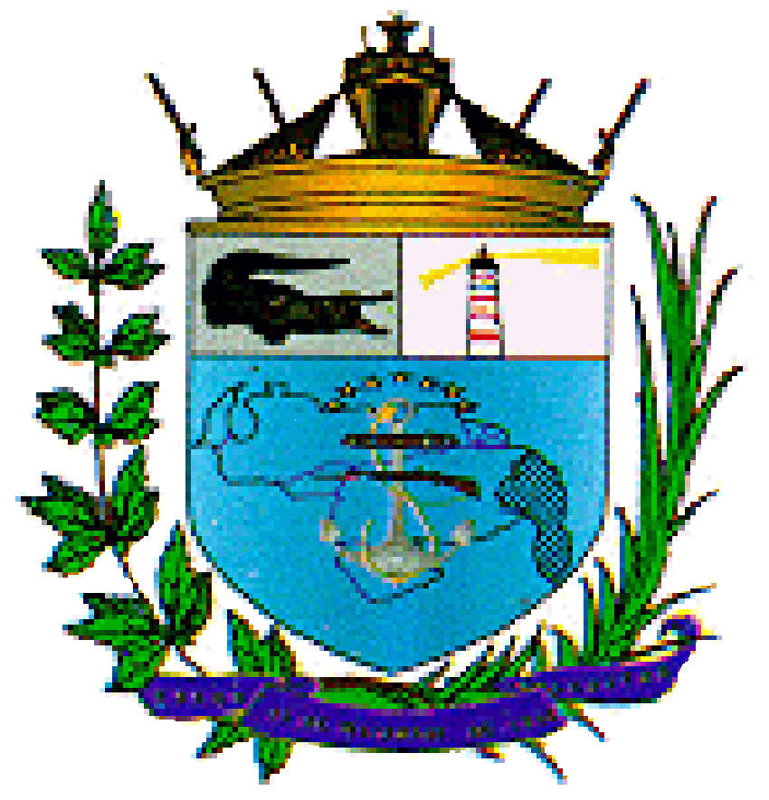 Escudo de la Infantería de Marina Bolivariana